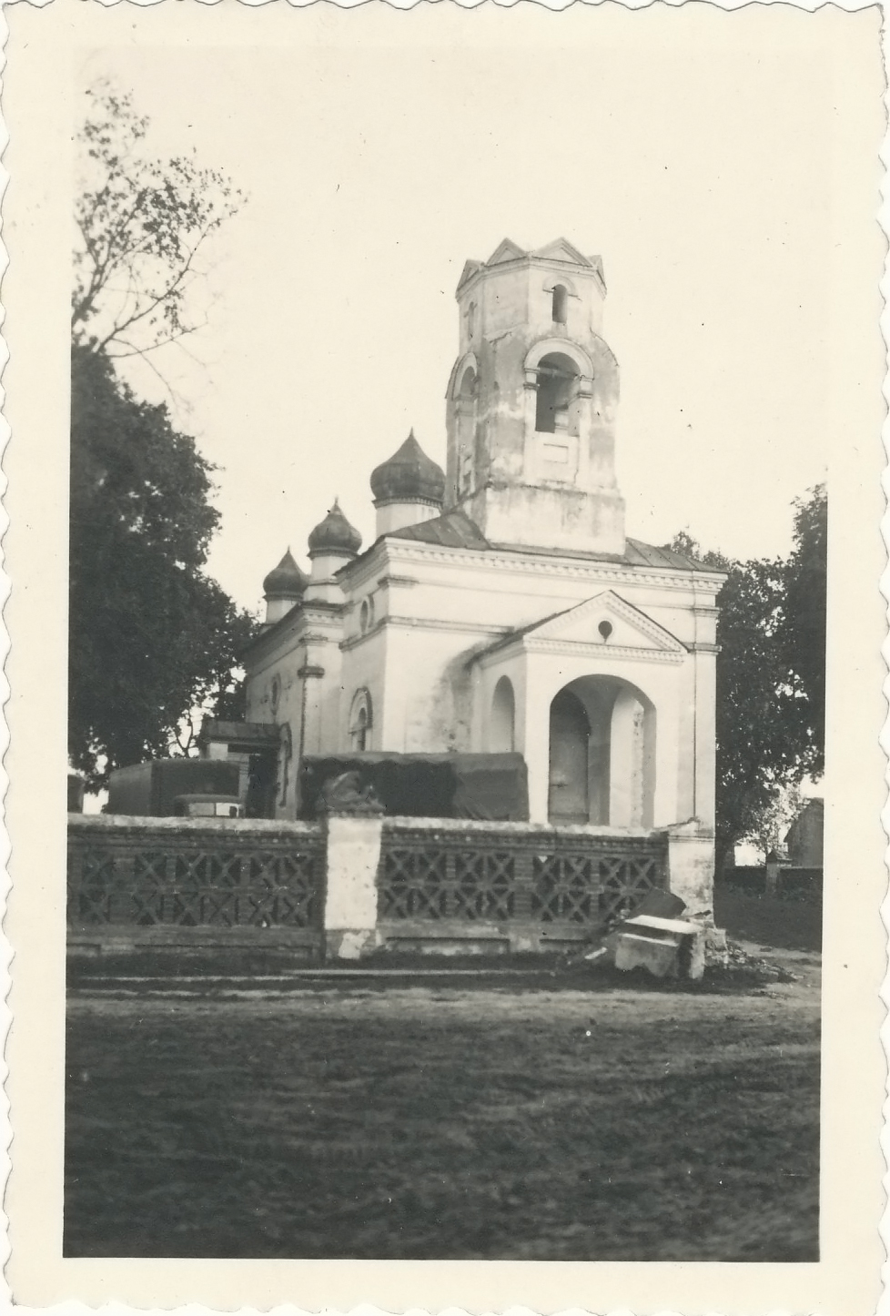 Беларуская (тарашкевіца): Амсьціслаў (Amścisłaŭ), вуліца Кіеўская (vulica Kijeŭskaja). Узьвіжанская царква-мураўёўка